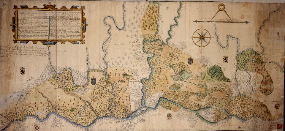 Atlas van de domeingoederen in het Ambt Montfort